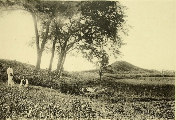 樂浪郡治址 (?) 其一 (平南大同郡大同江面)